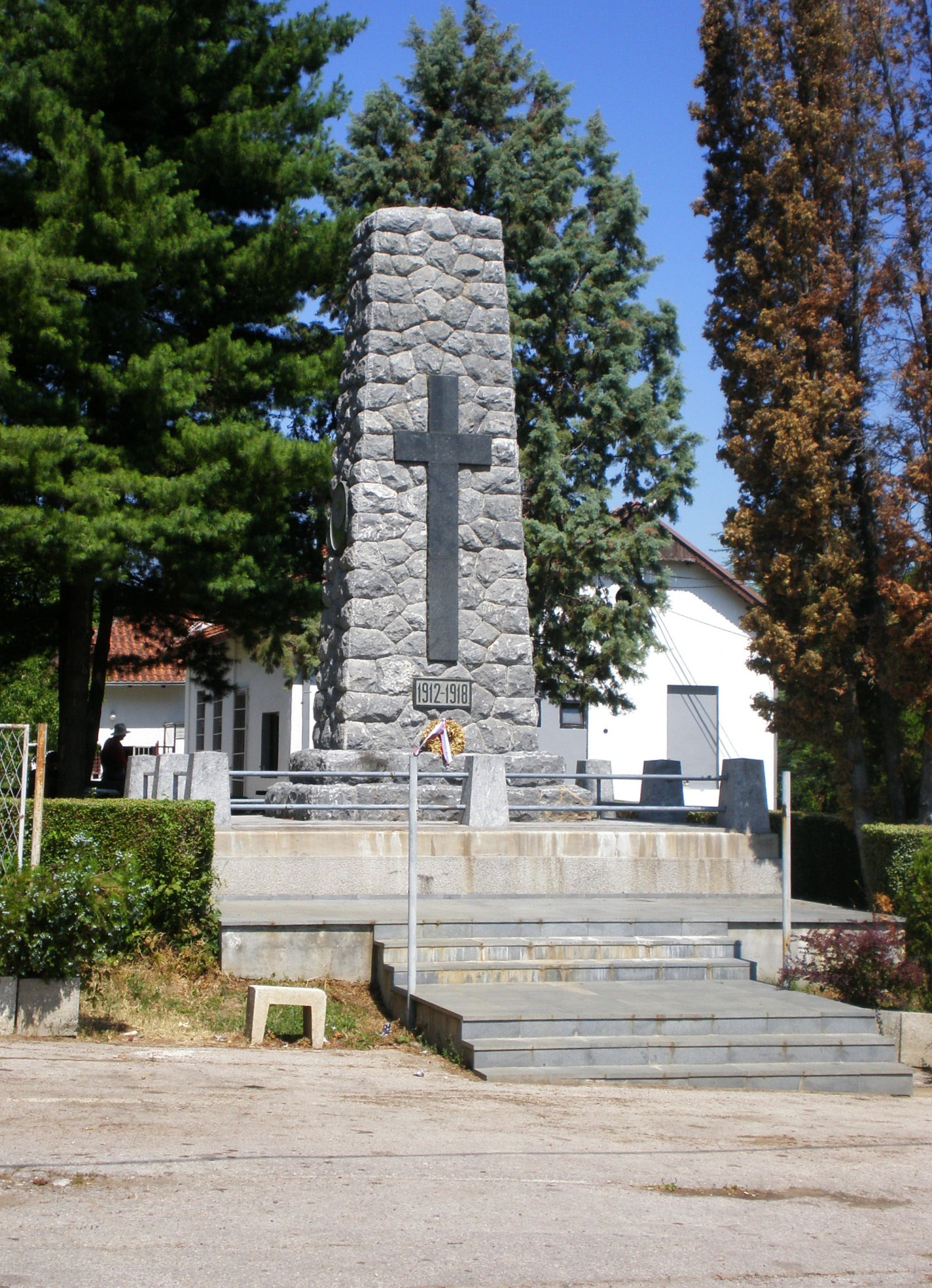 Споменик је подигнут ратницима који су погинули за време Првог светског и балканских ратова на подручју Чачка. На споменику су уклесани симболи четири верске заједнице: православне, католичке, исламске и јеврејске. Током Другог светског рата уклоњени су симболи исламске и јеврејске заједнице по налогу нациста. 262 војника је сахрањено под овим спомеником из састава централних сила: Чешке, Аустрије, Угарске као И војници из Војводине, Хрватске, Босне и Херцеговине и Италије. Споменик је откривен 23. септембра 1934. године, уз присуство представника посланстава из Француске, Енглеске, Белгије, Италије, Немачке, Бугарске, Румуније и Турске. Обновљен је 2007. године.